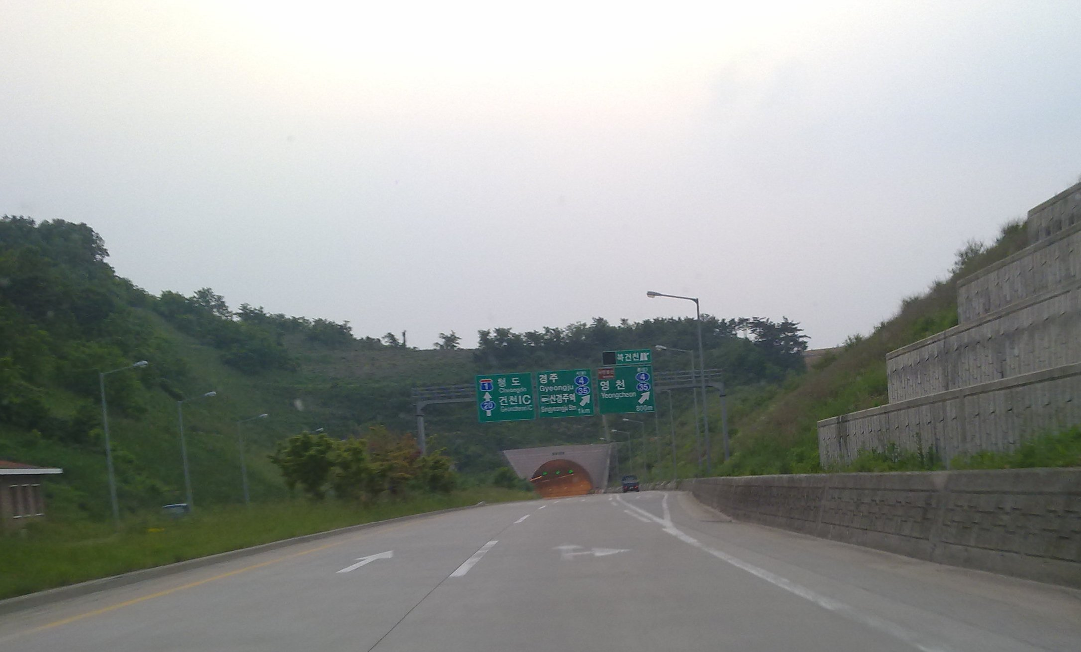 국도 20호선 건천터널(건천방향)